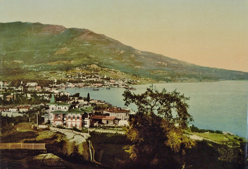 Vista di Jalta dalla collina del Tè